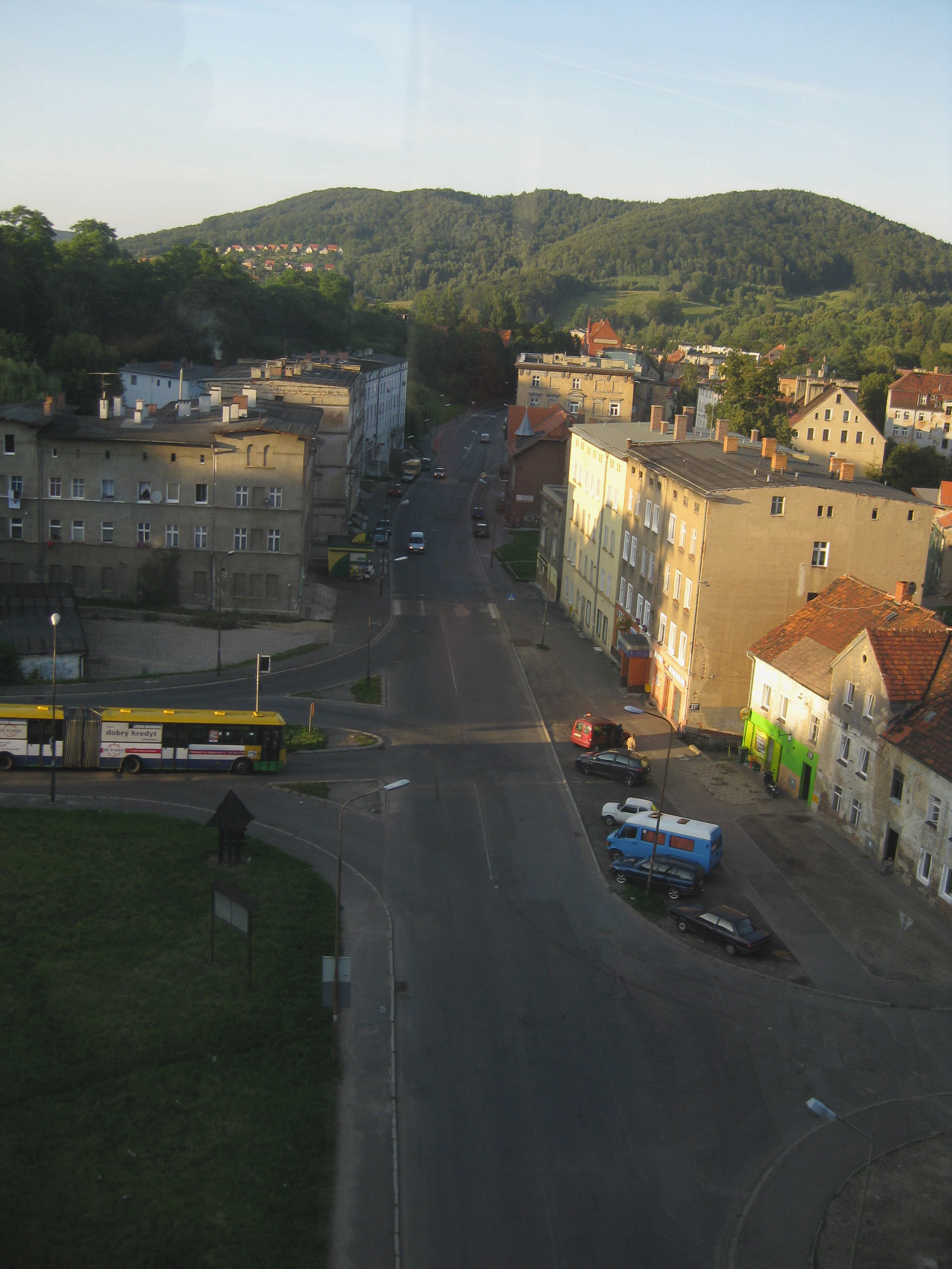 Ulica Niepodległości w Wałbrzychu, fotografia z wiaduktu kolejowego.